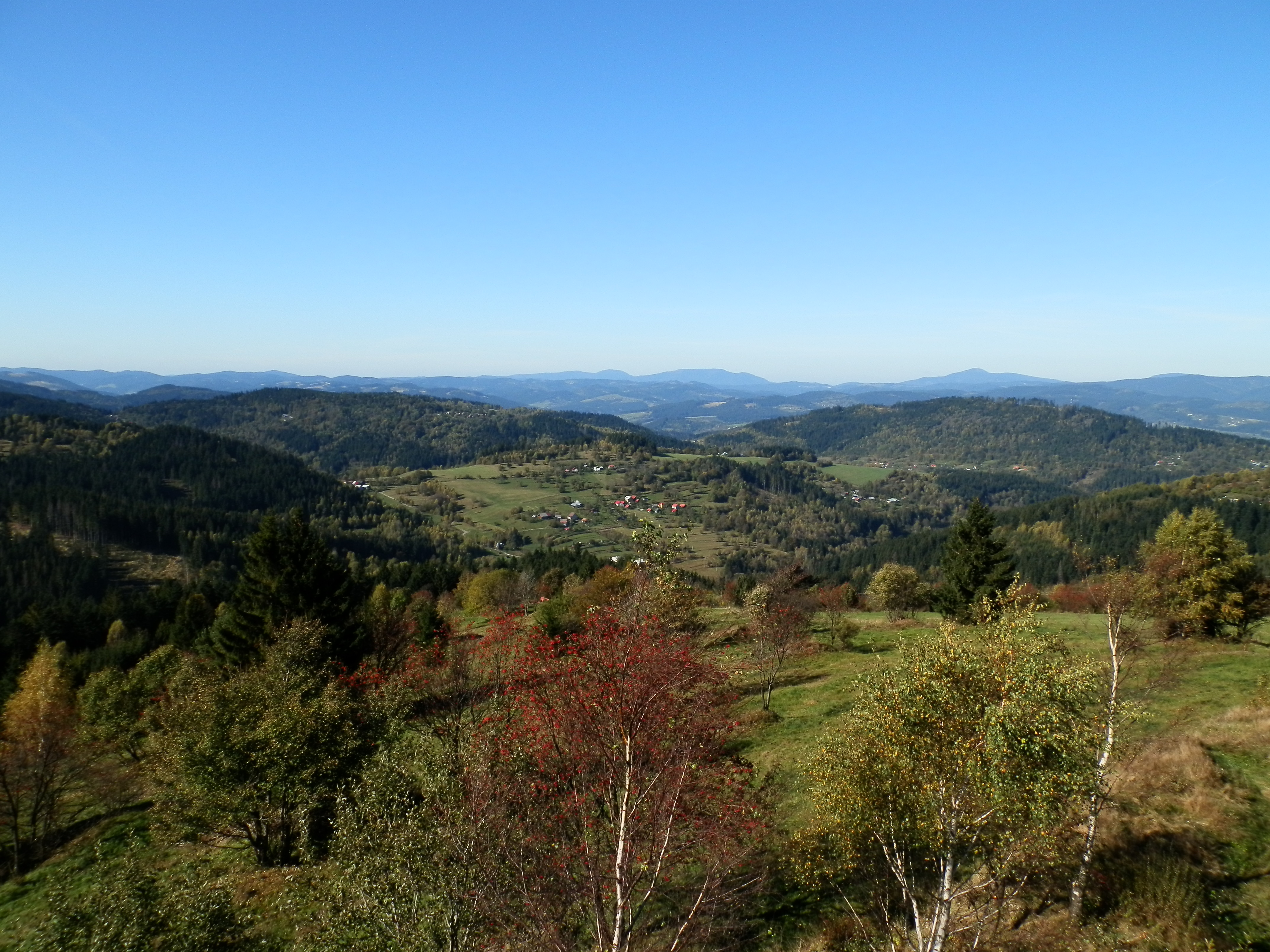 Nad osadou Petránky